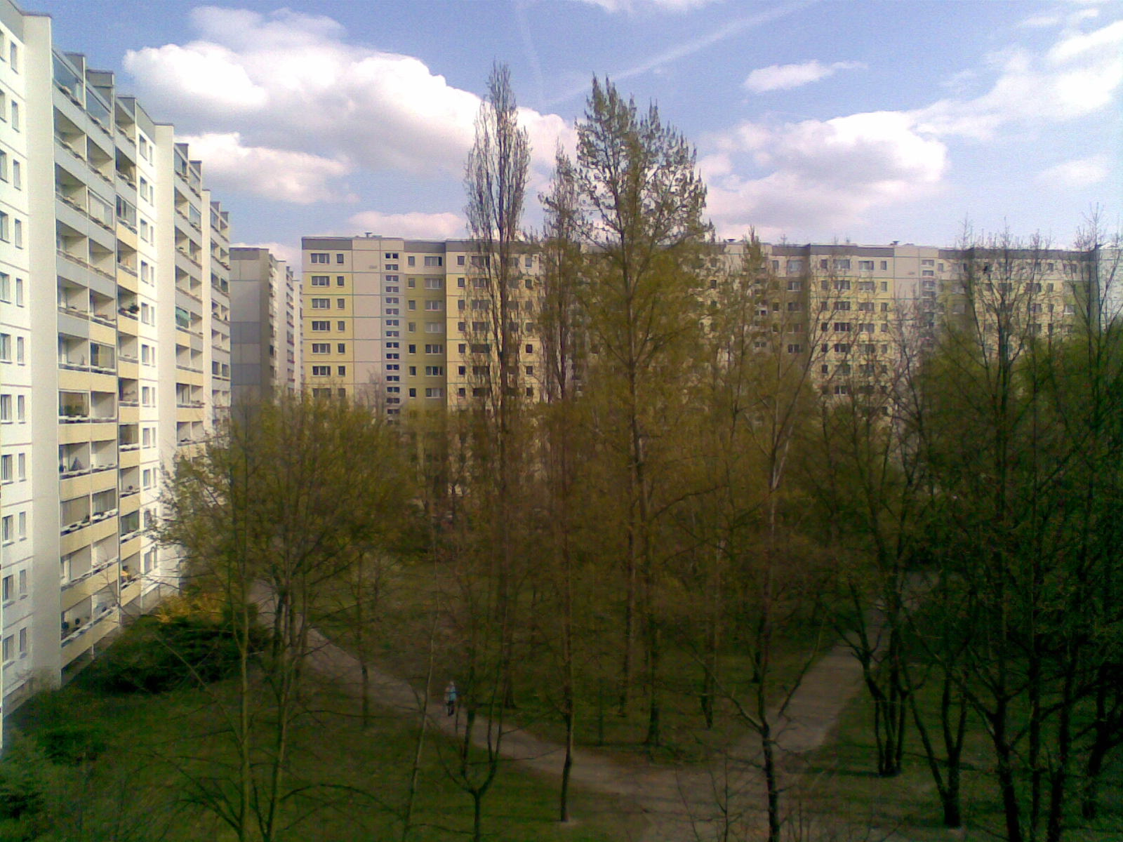 Wohnhäuser der Wohnungsbauserie WBS 70/11, errichtet 1977. Berlin, Neubauviertel Greifswalder Straße, Ortsteil Prenzlauer Berg, Bezirk Pankow